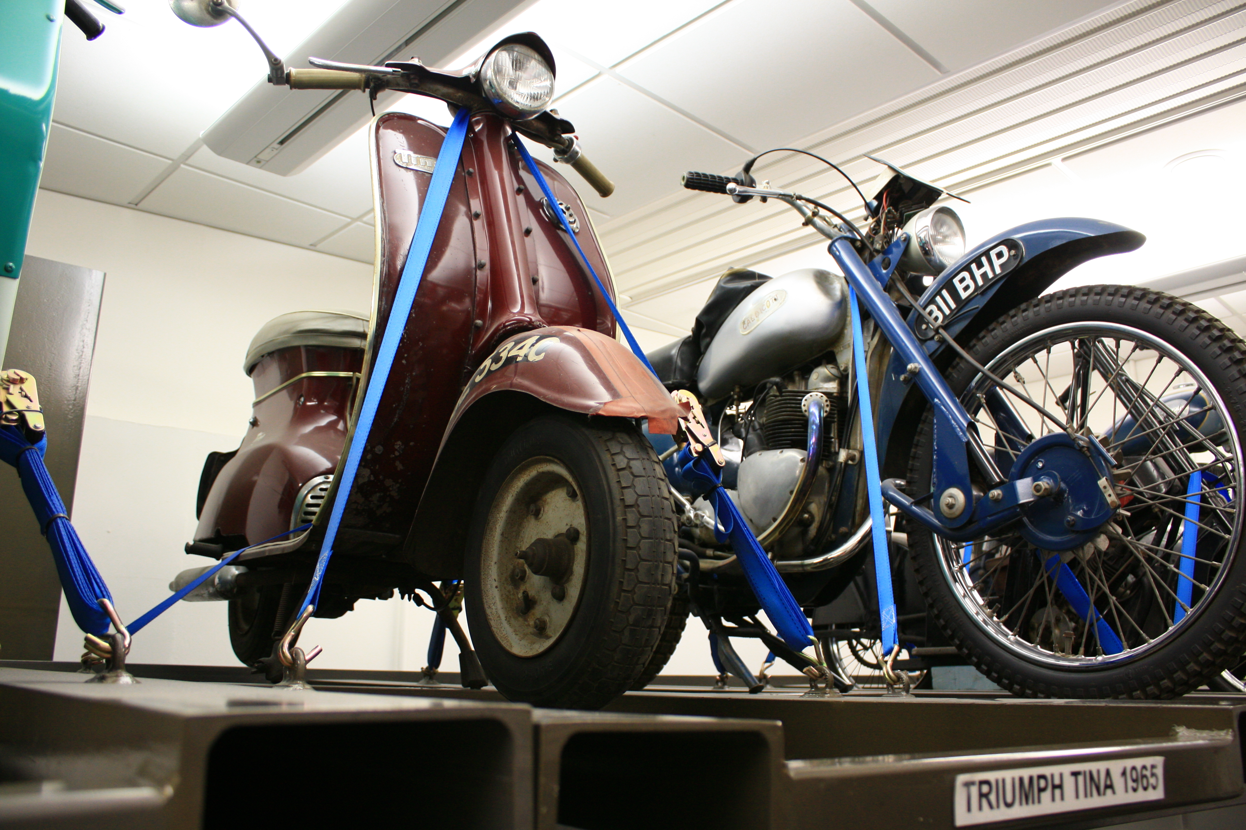 Transport Museum, UK. 2009